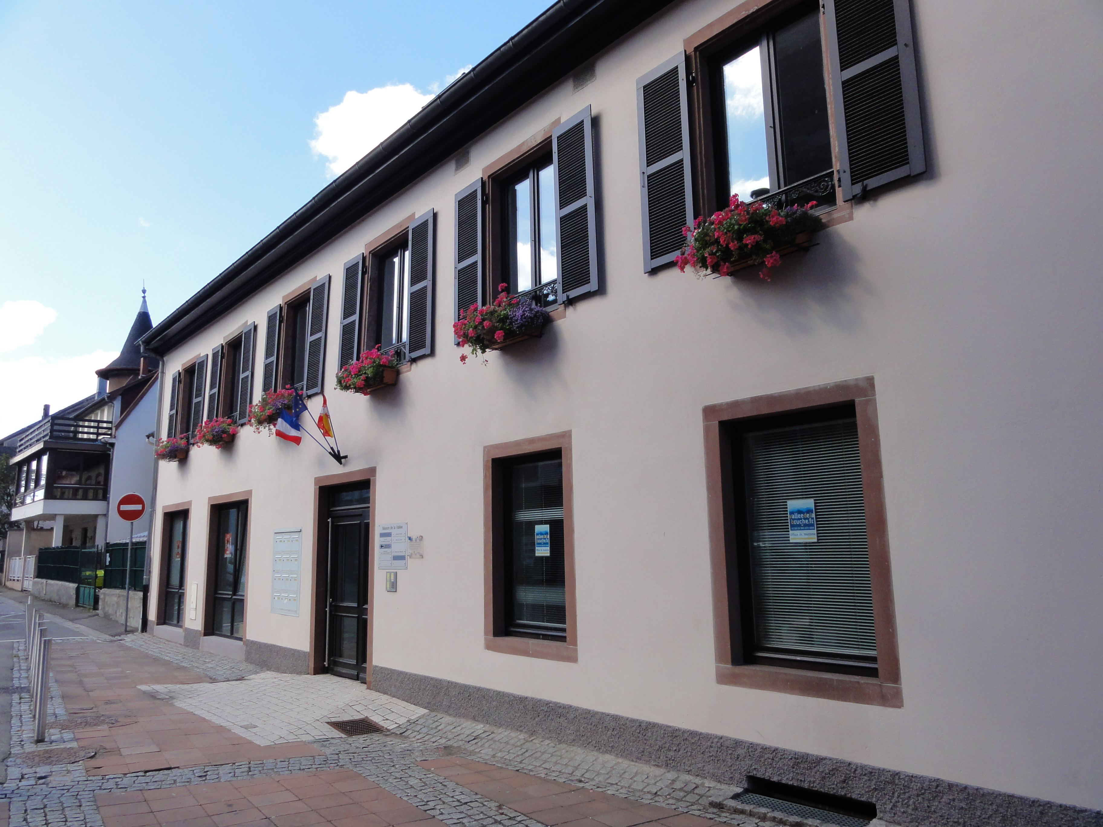 Alsace, Bas-Rhin, Schirmeck, Communauté de Communes de la Haute-Bruche, 114 Grand'Rue